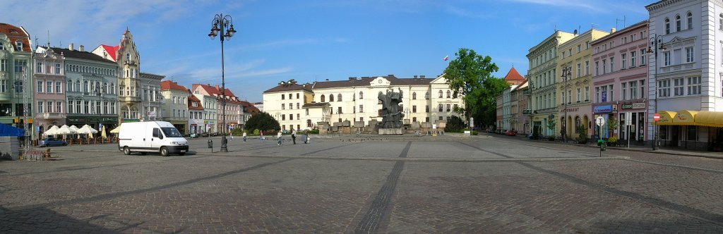 Panorama Starego Rynku 2006 r.